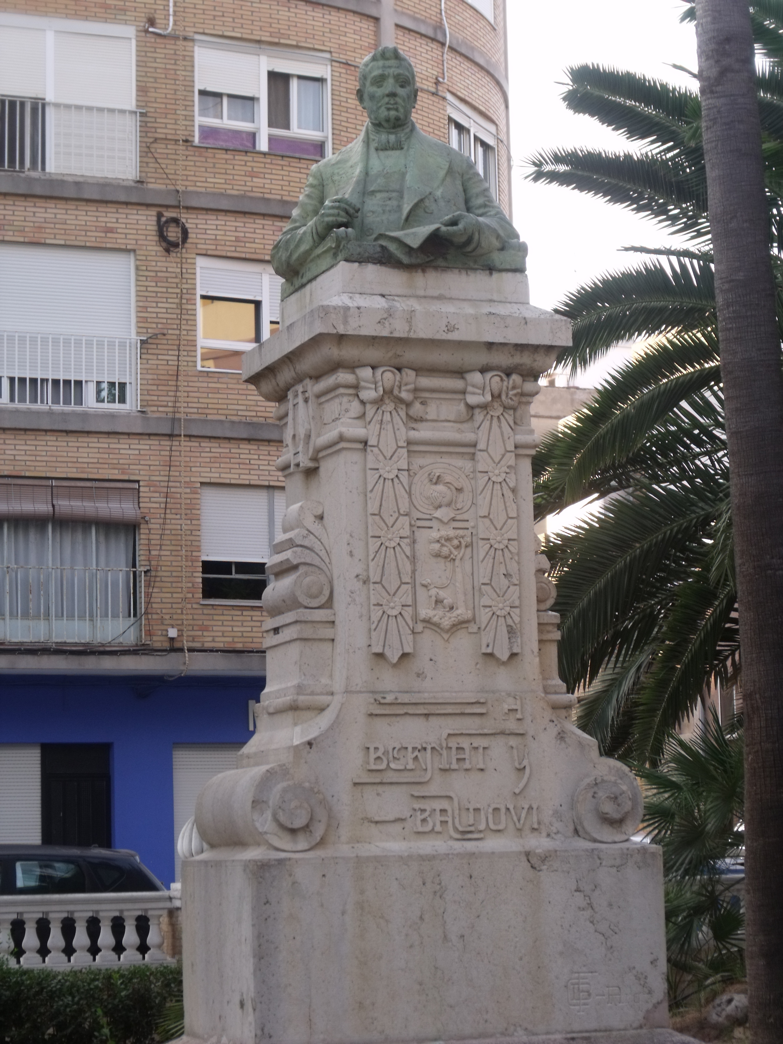 Detalles del paseo de la estación de Sueca, Busto de Bernat i Baldoví